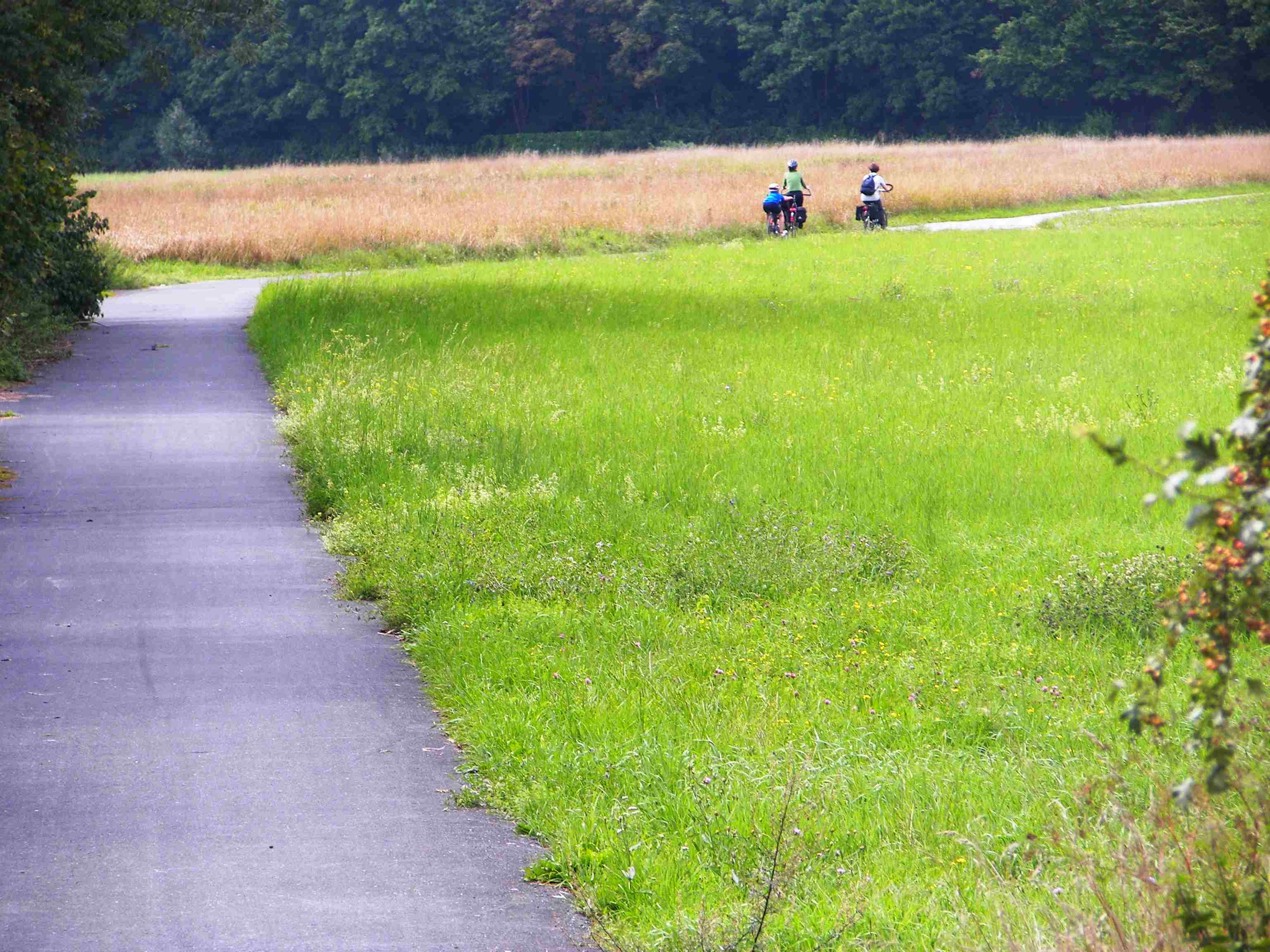 Aischtal-Radweg bei Adelsdorf